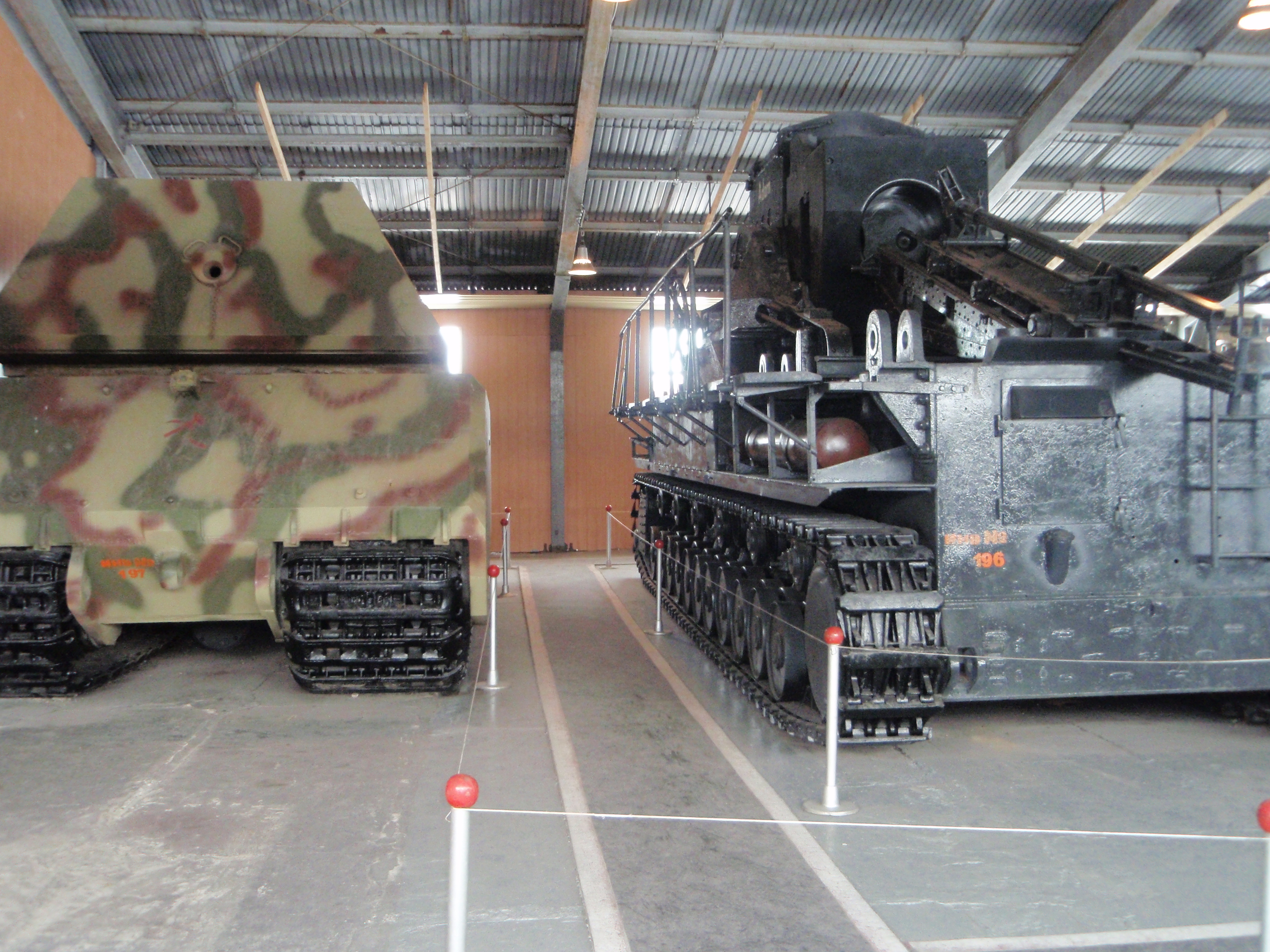 Немецкий сверхтяжёлый танк Maus и САУ Adam (вид с кормы) в Кубинке